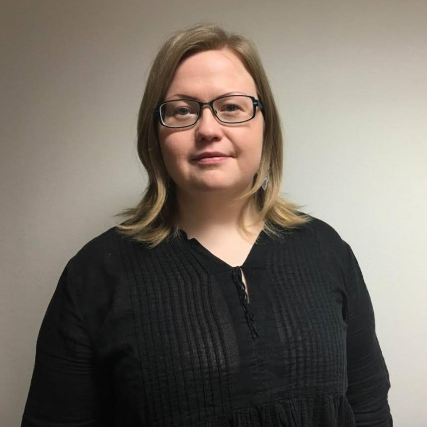 Tiina Sanila-Aikio